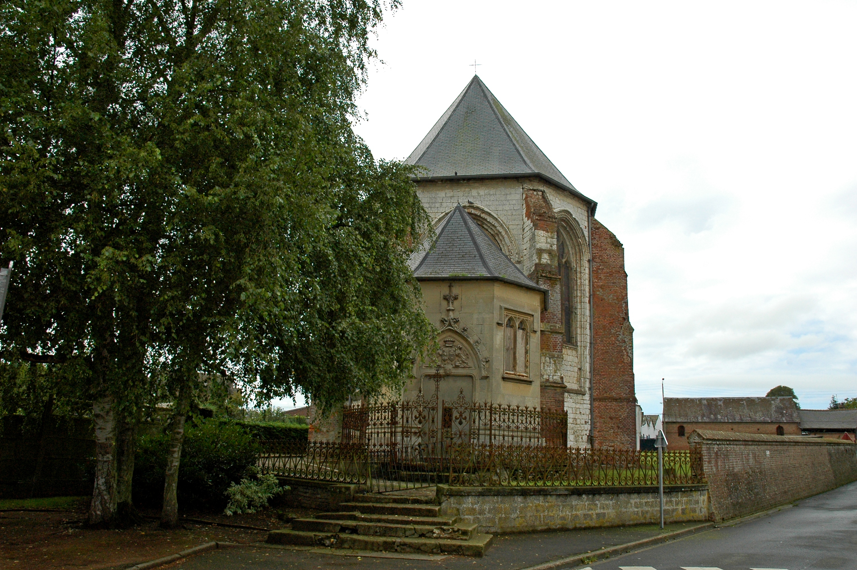 Friville-Escarbotin (Somme, France). L'église.